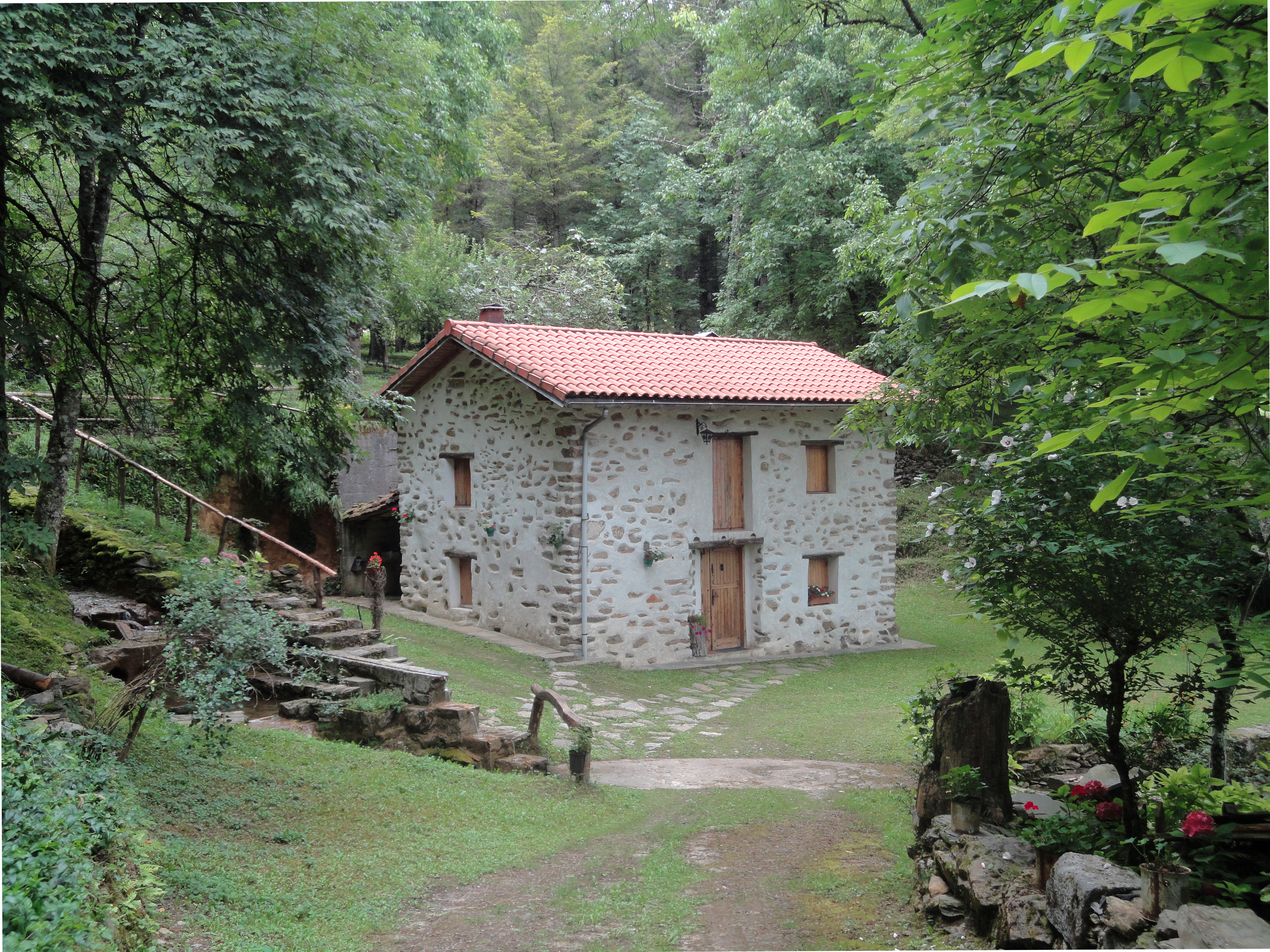 Urkiako errota